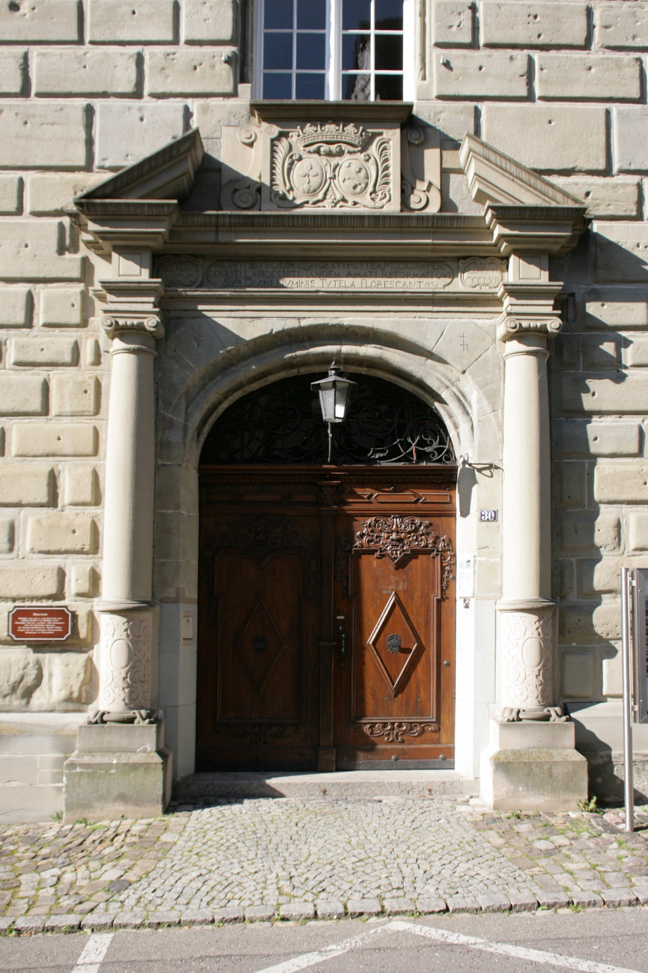 Städtisches Museum Überlingen, Krummebergstraße 30 in Überlingen